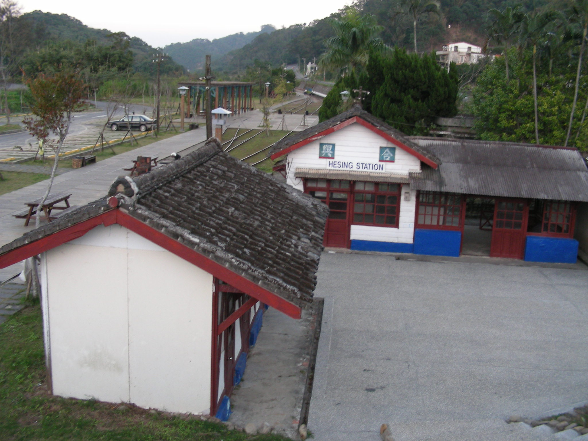 Taiwan "He Sing" Railway Station